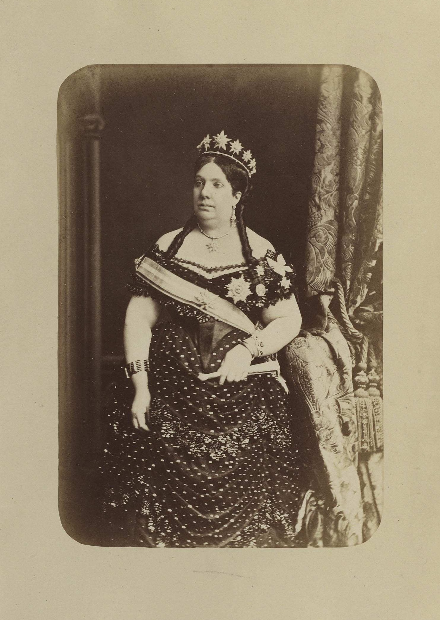 Isabel II de España (1833-1868)